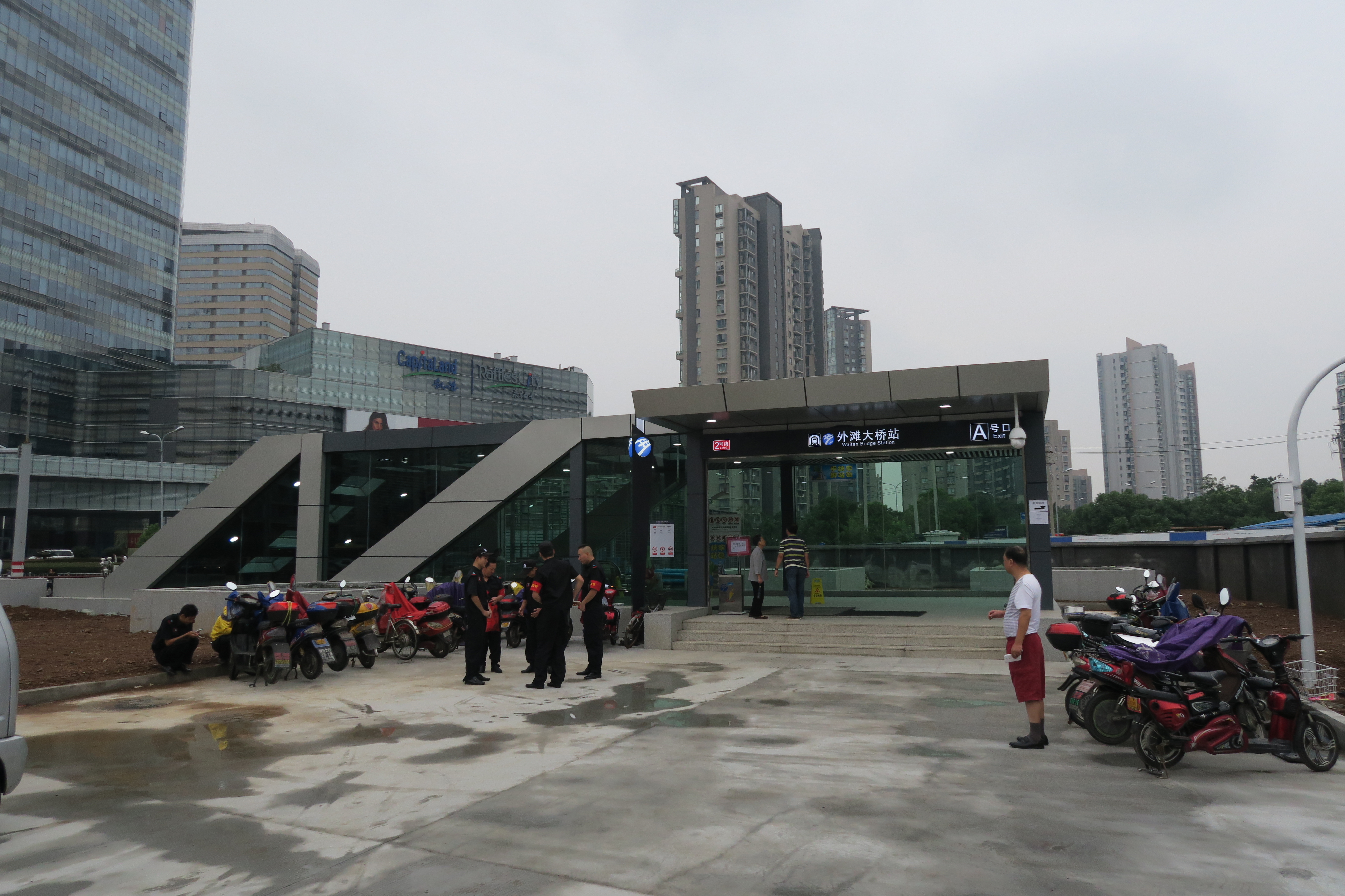 宁波轨道交通2号线外滩大桥站